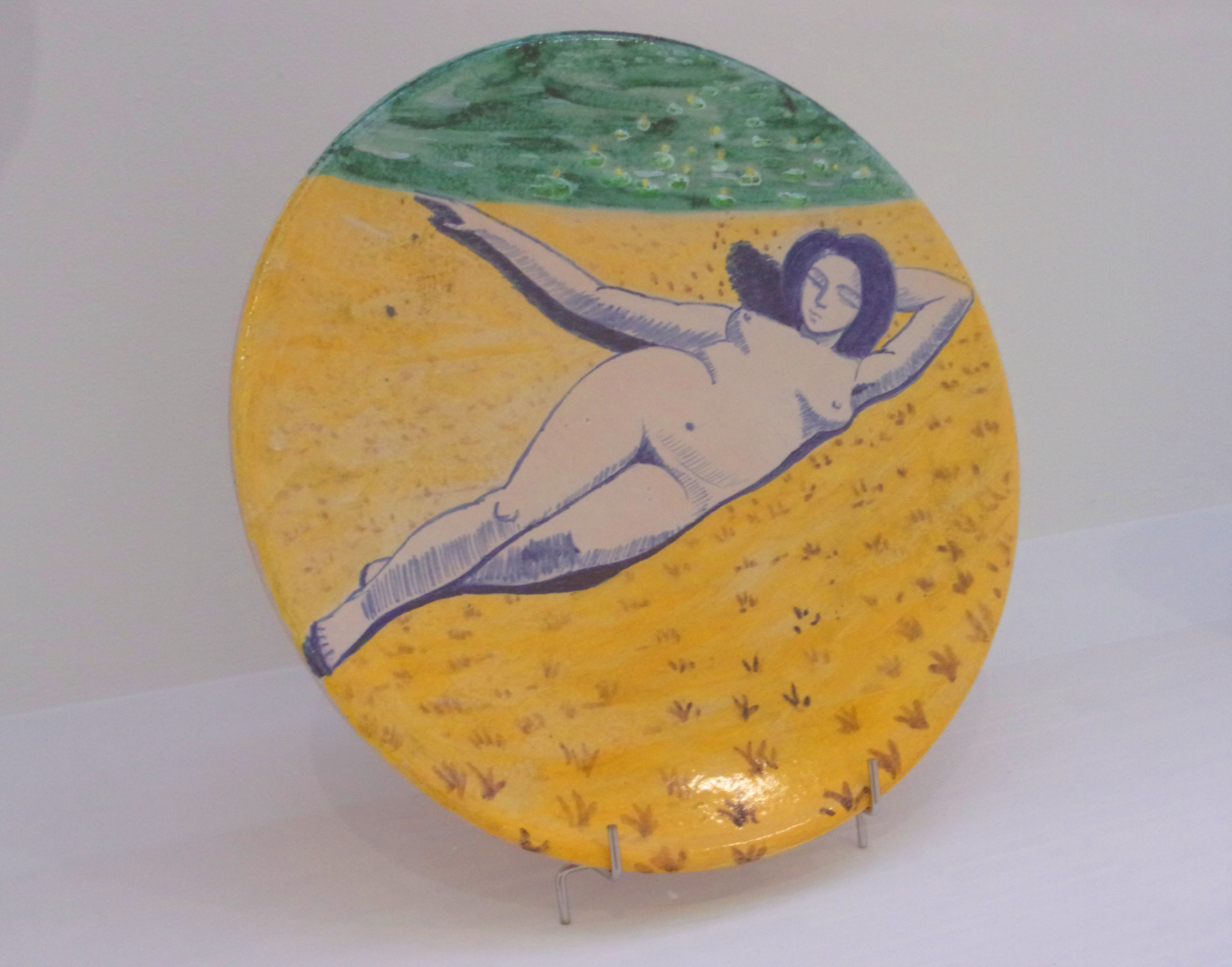 Plat nu féminin décoré par Georgette Agutte (1909). Musée de Grenoble.